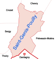 Communes limitrophes de Saint-Genis-Pouilly